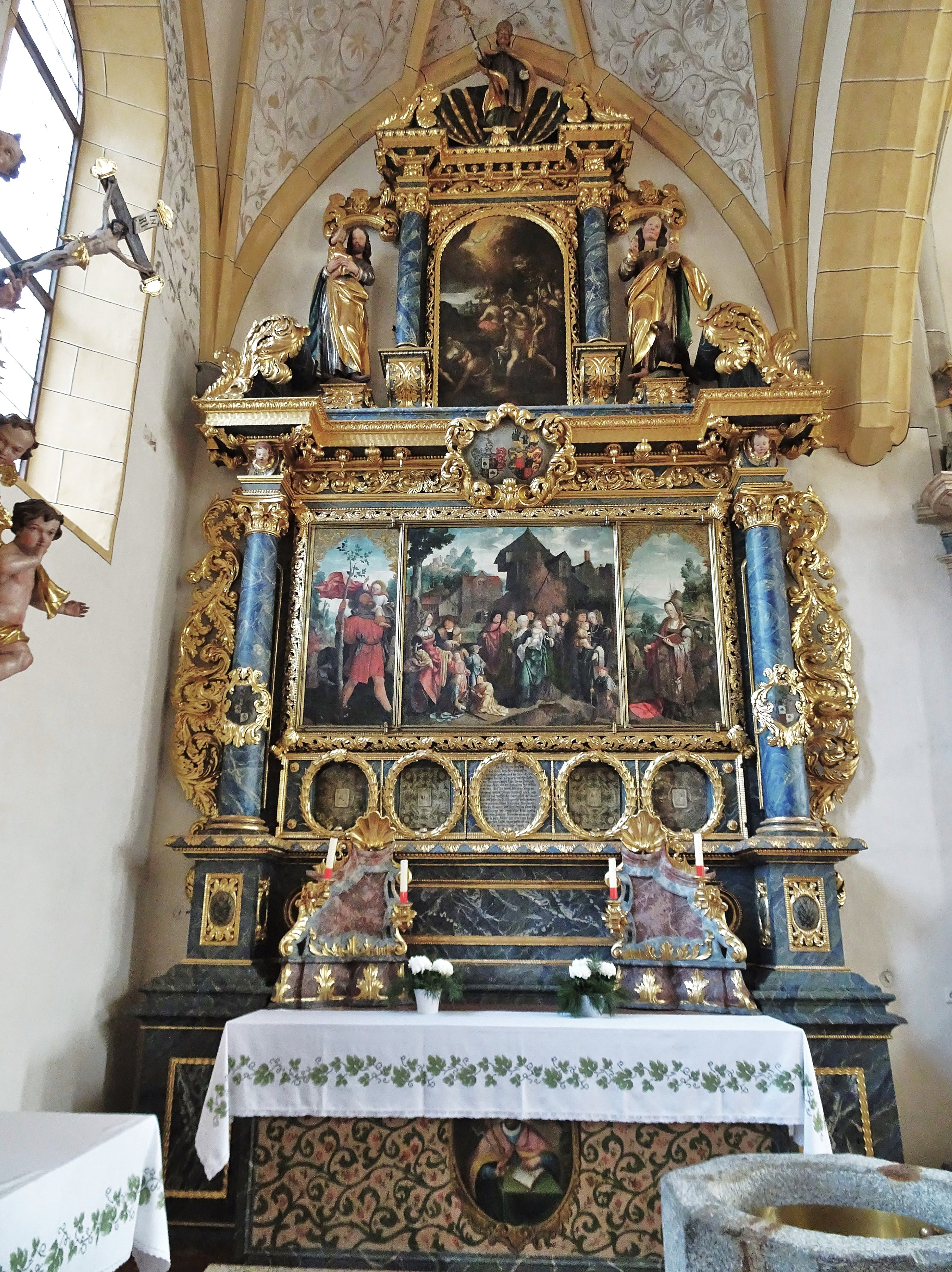 Kath. Pfarrkirche Hl. Martin (Obervellach), der Frangipani- oder Jan-von-Scorel-Altar